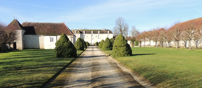 Château au bout de l'allée d'accès à la cour d'honneur avec les communs de droite et de gauche derrière les buis du jardin sur les côtés de l'allée